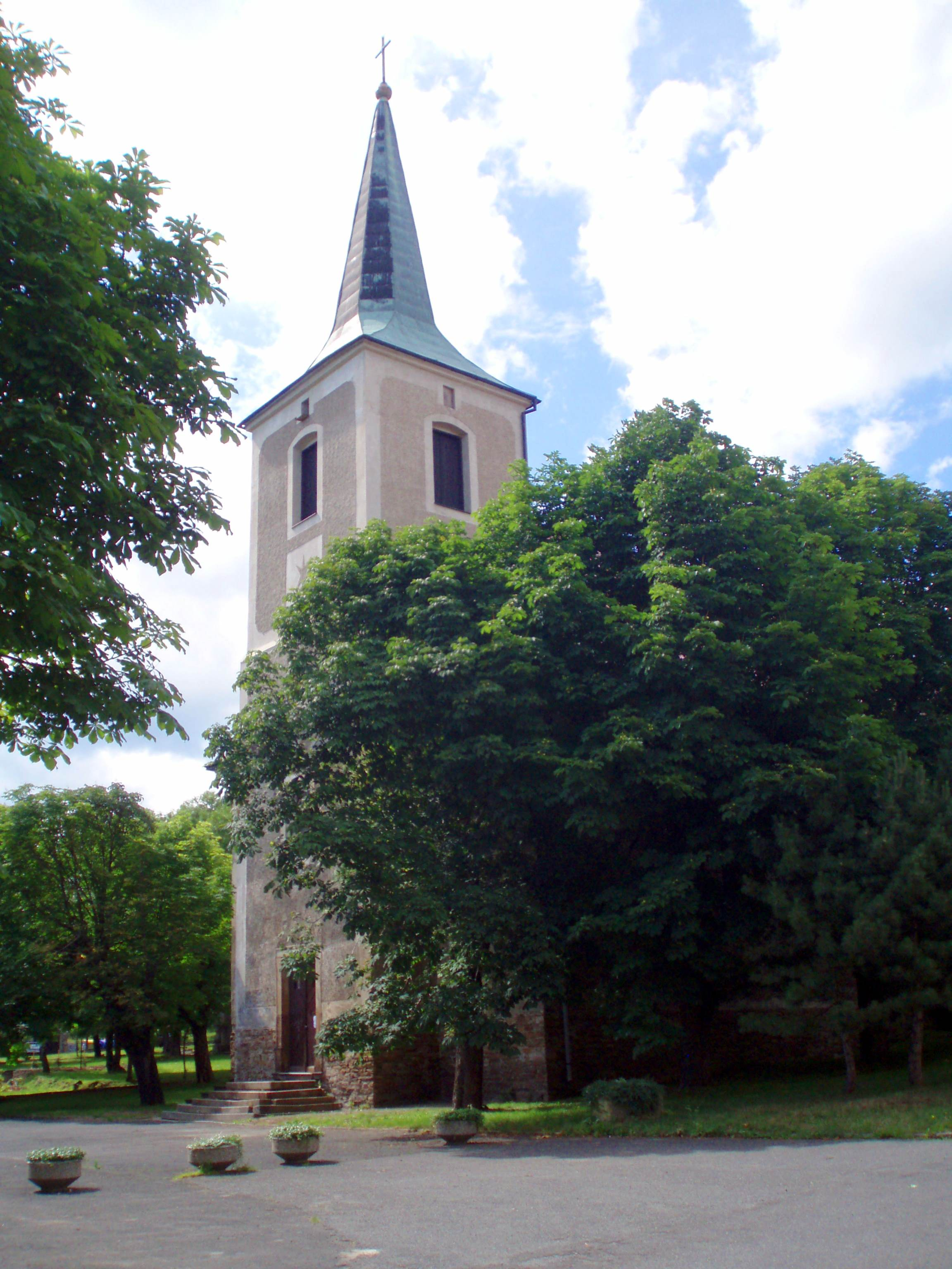 Katholische Kirche in Kupferberg